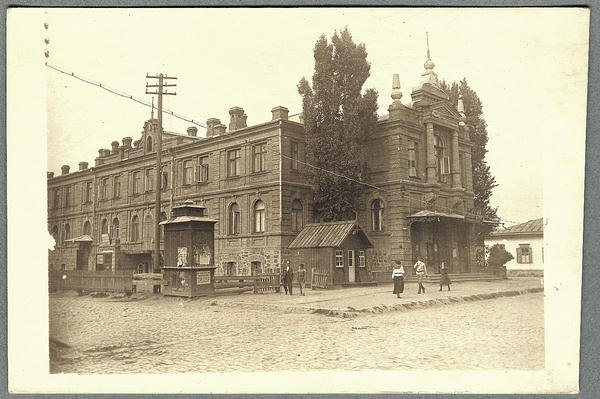 Здание Пушкинской народной аудитории в Кременчуге, до 1917 года